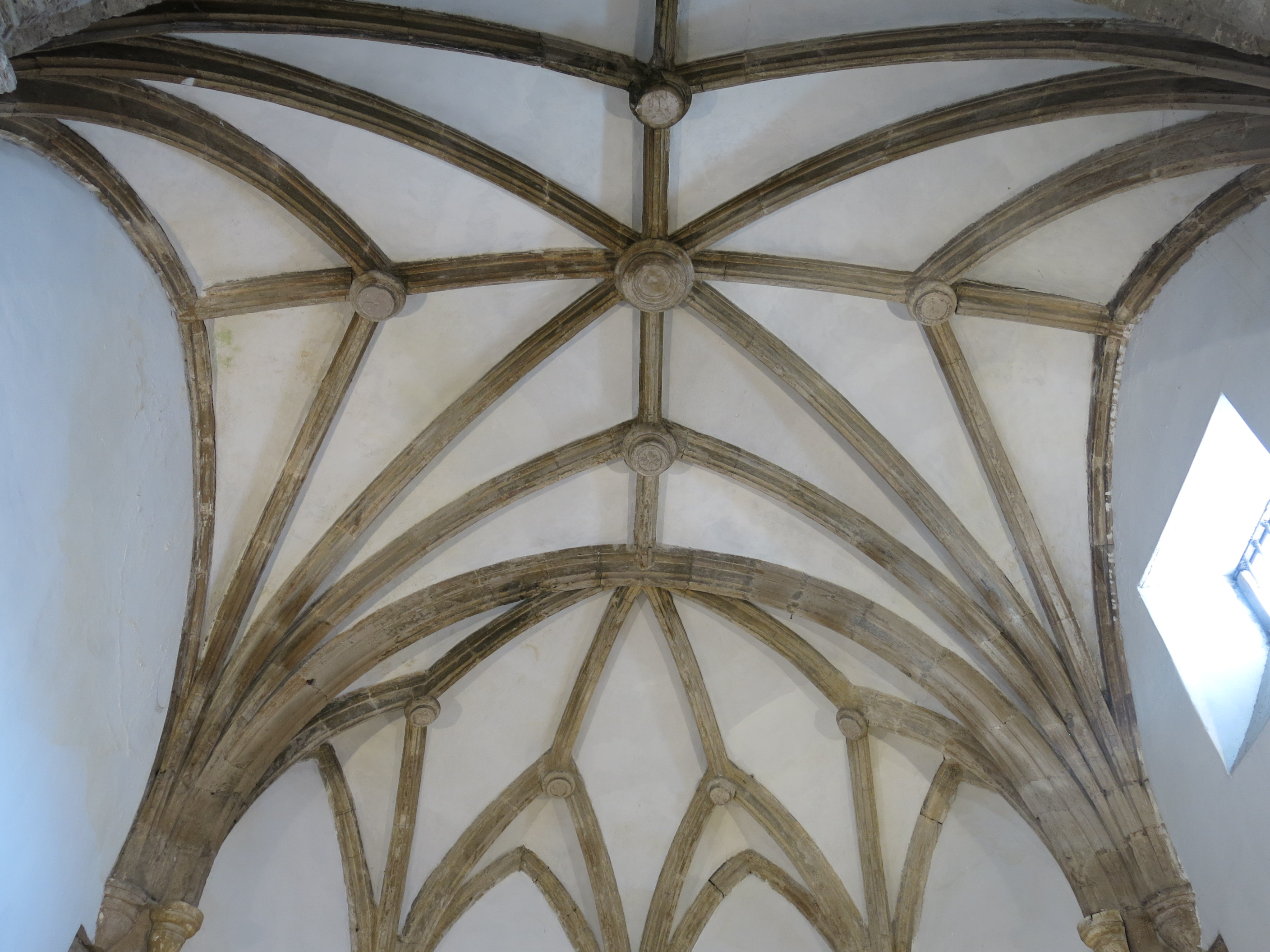 Conjunto histórico artístico de Avilés